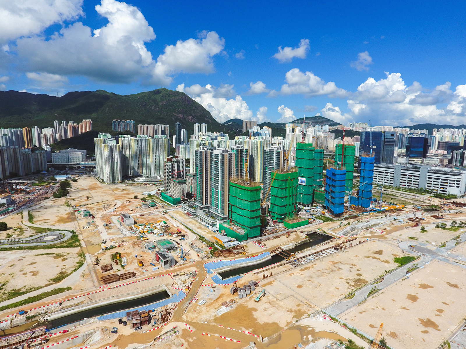 Kai Tak Development Site